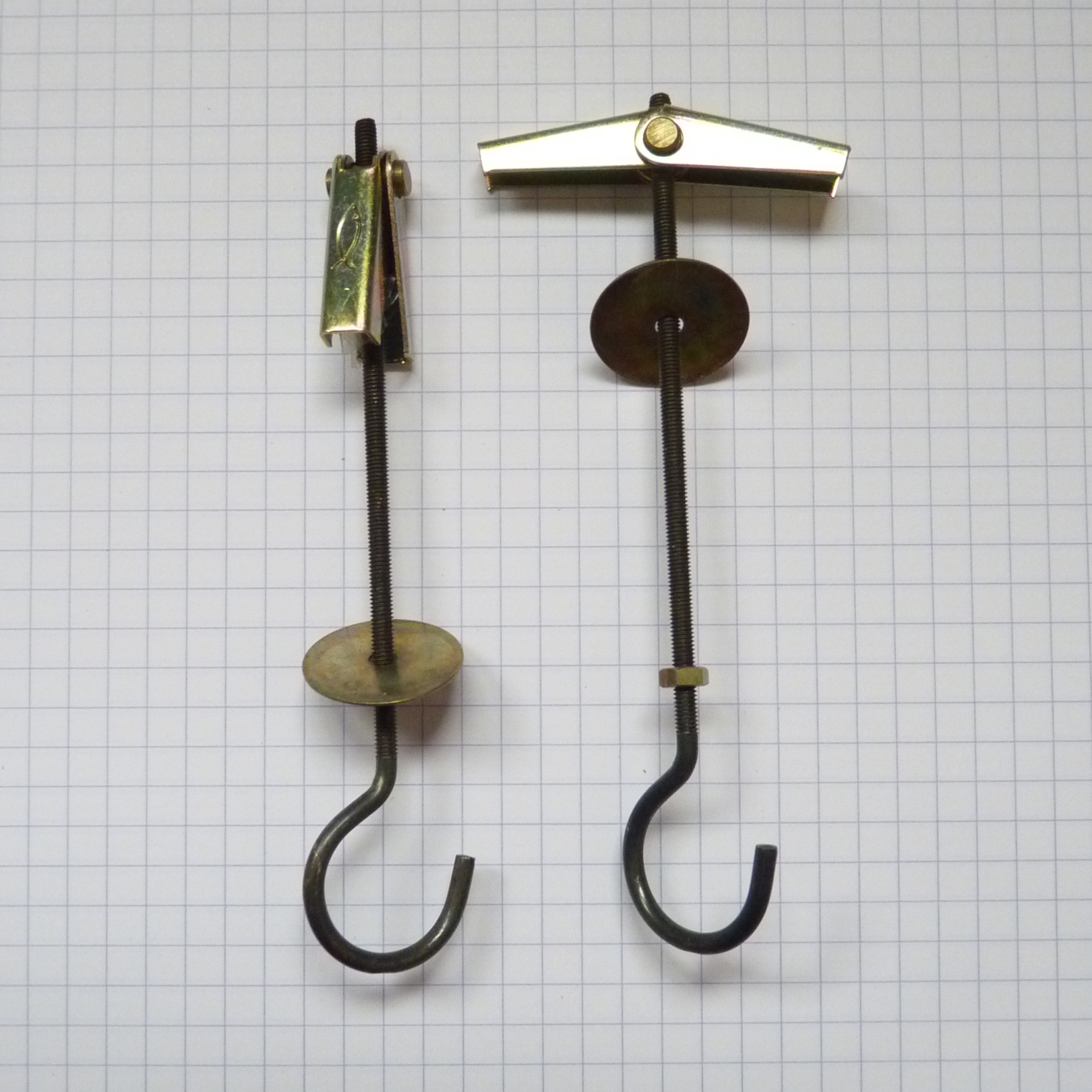 Klappdübel (butterfly anchor, spring toggle)